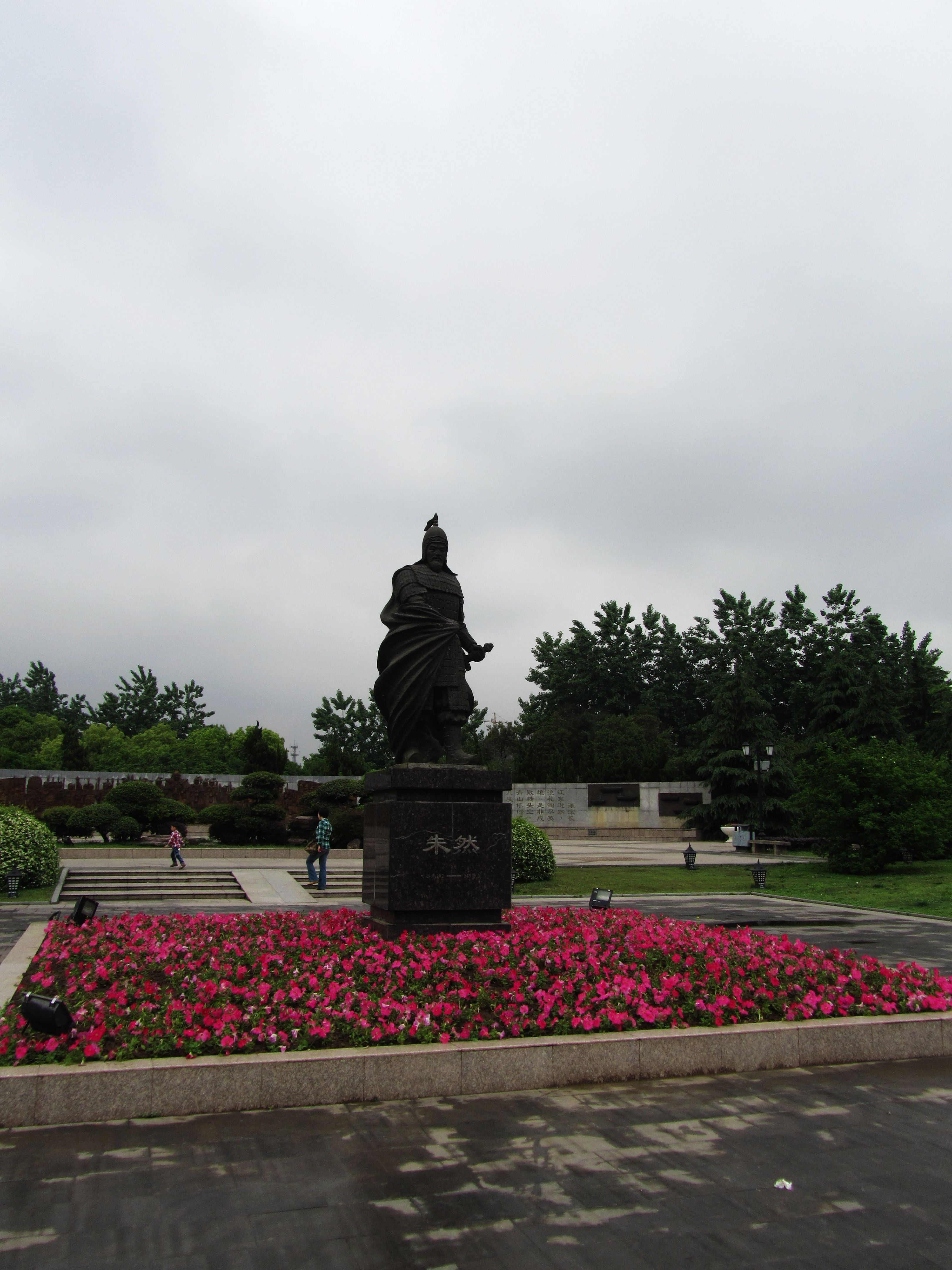 三国朱然文化园内的朱然雕像。